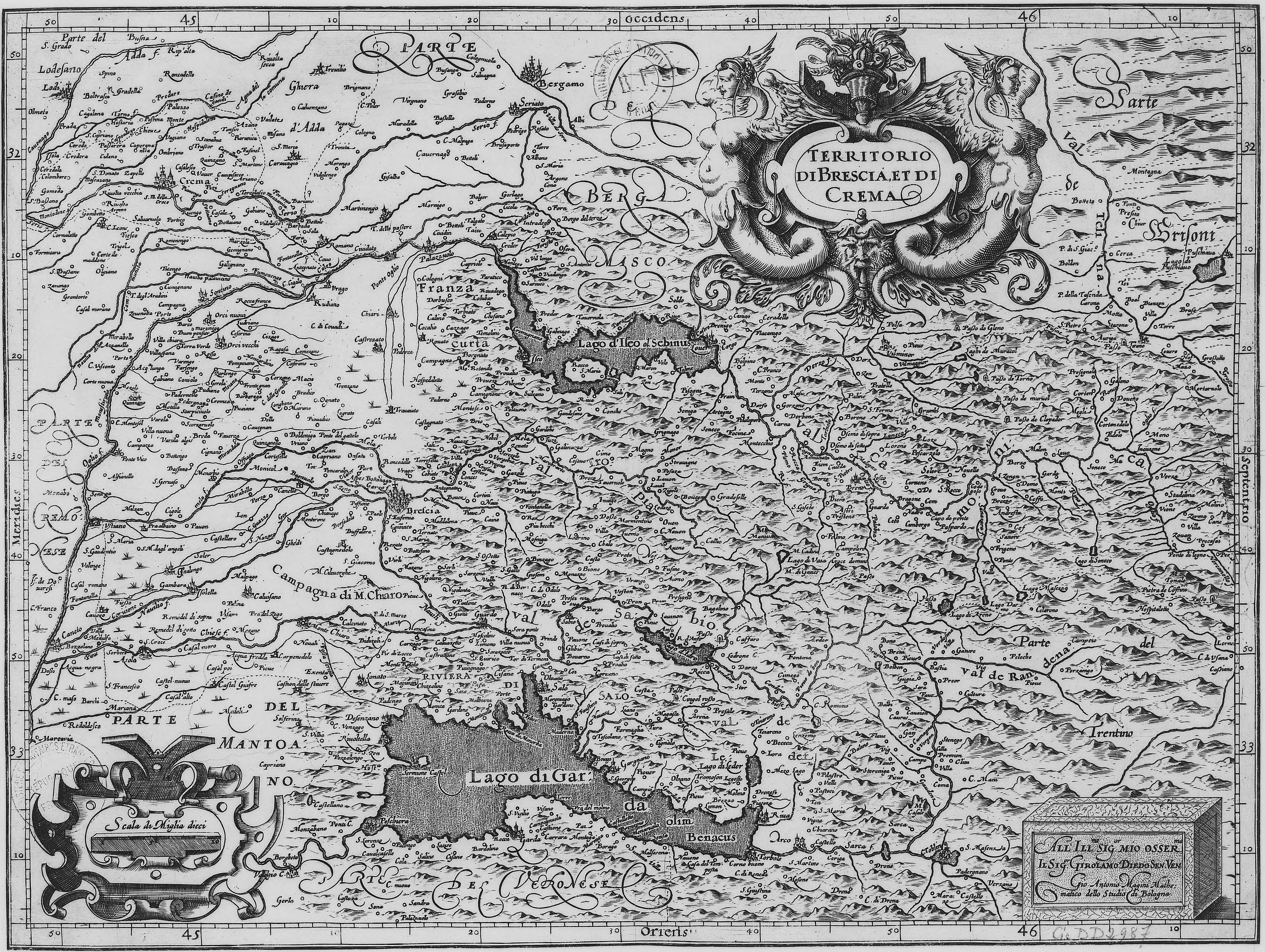 Territorio di Brescia et di Crema.